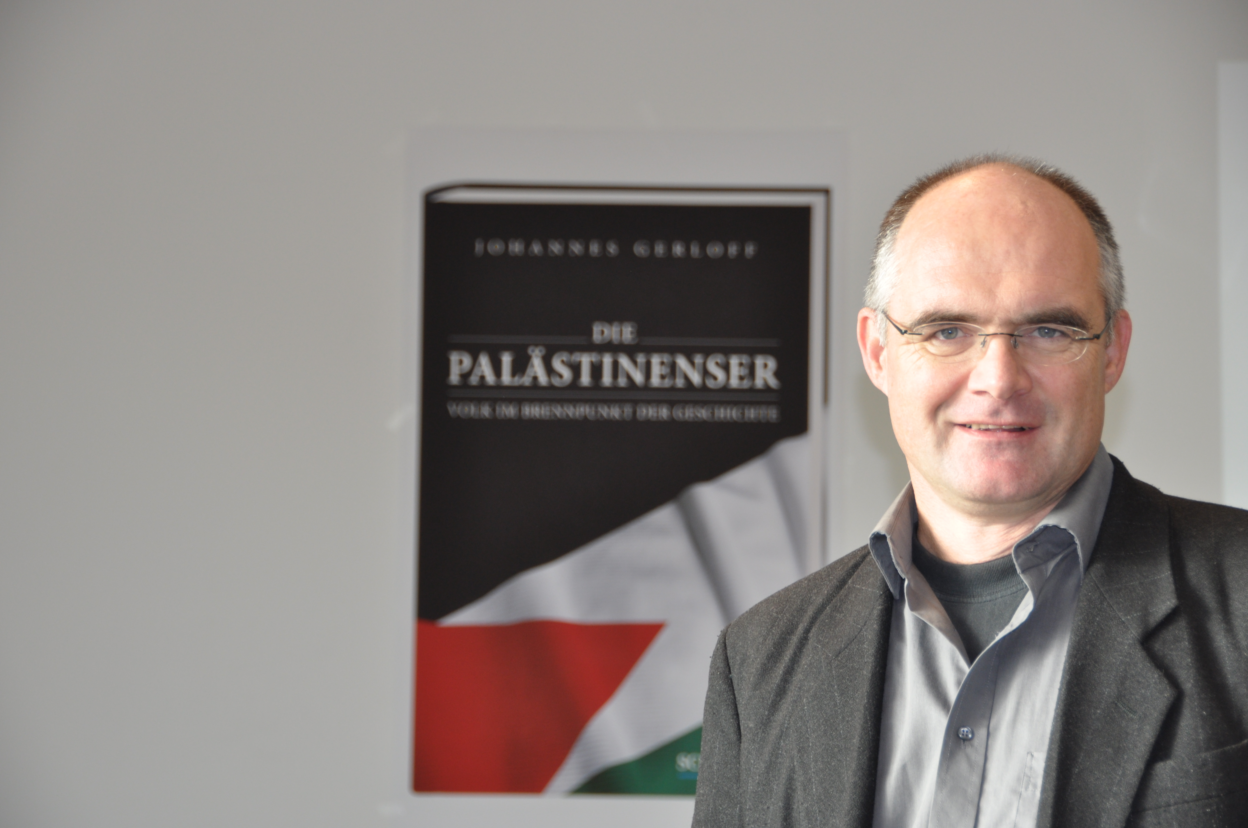 Der Journalist Johannes Gerloff hat am 16. November 2011 in Berlin sein Buch "Die Palästinenser" vorgestellt.